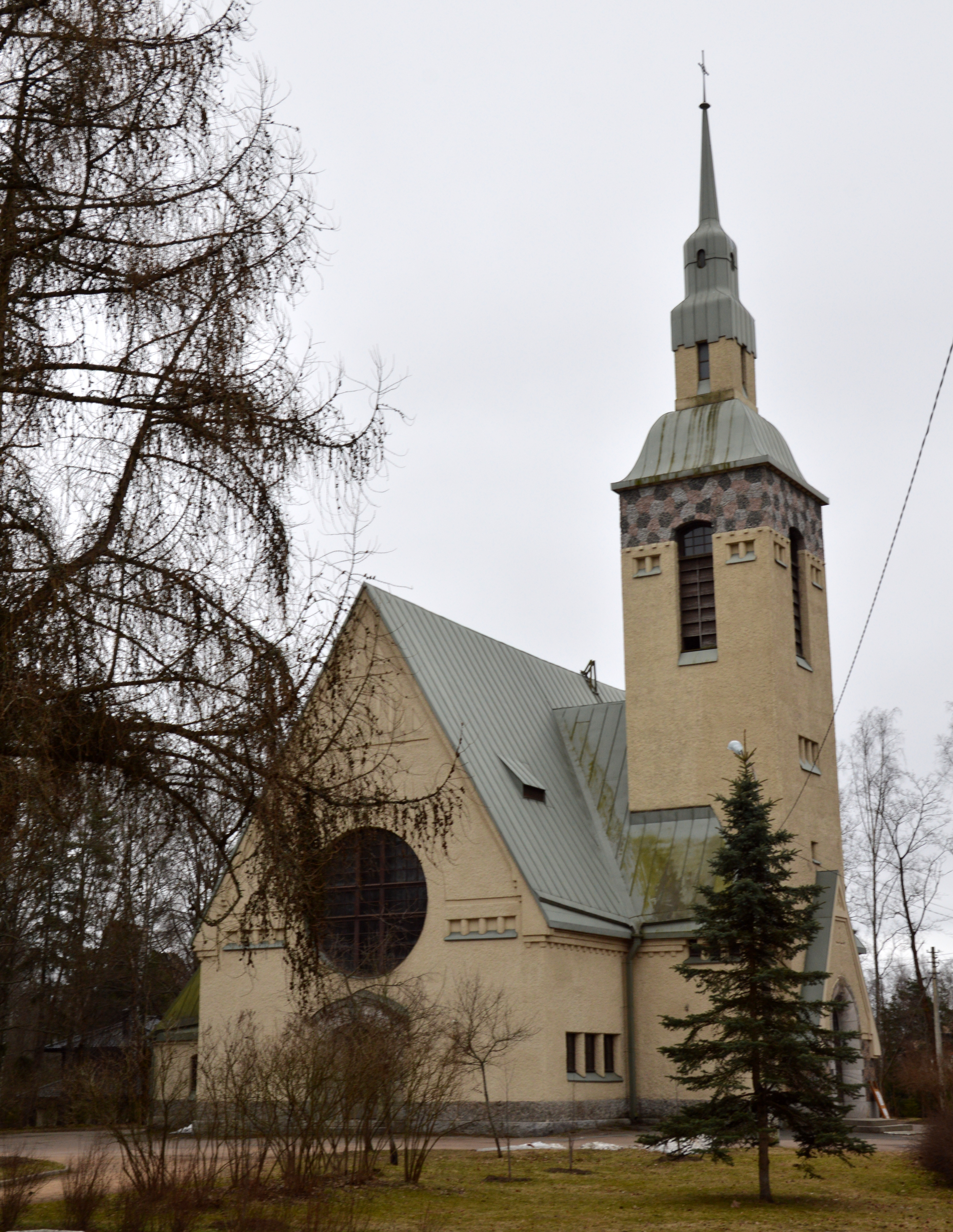 Кирха: проспект Ленина, 13, Зеленогорск, Курортный район, Санкт-Петербург